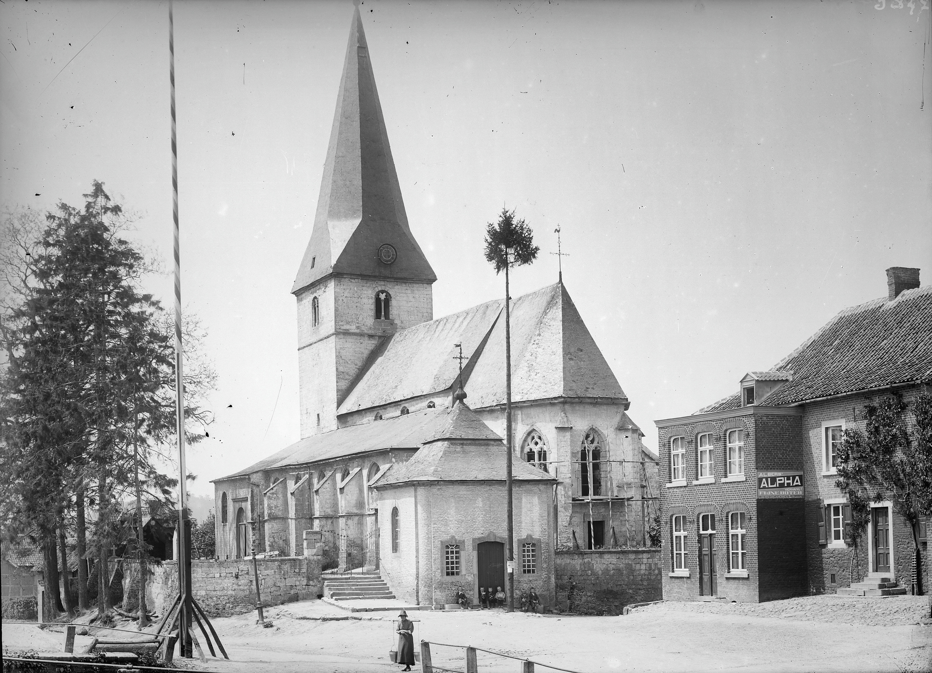 Sint Brigidakerk: kerk naar het zuid-oosten (opmerking: Fotonummer 2622)